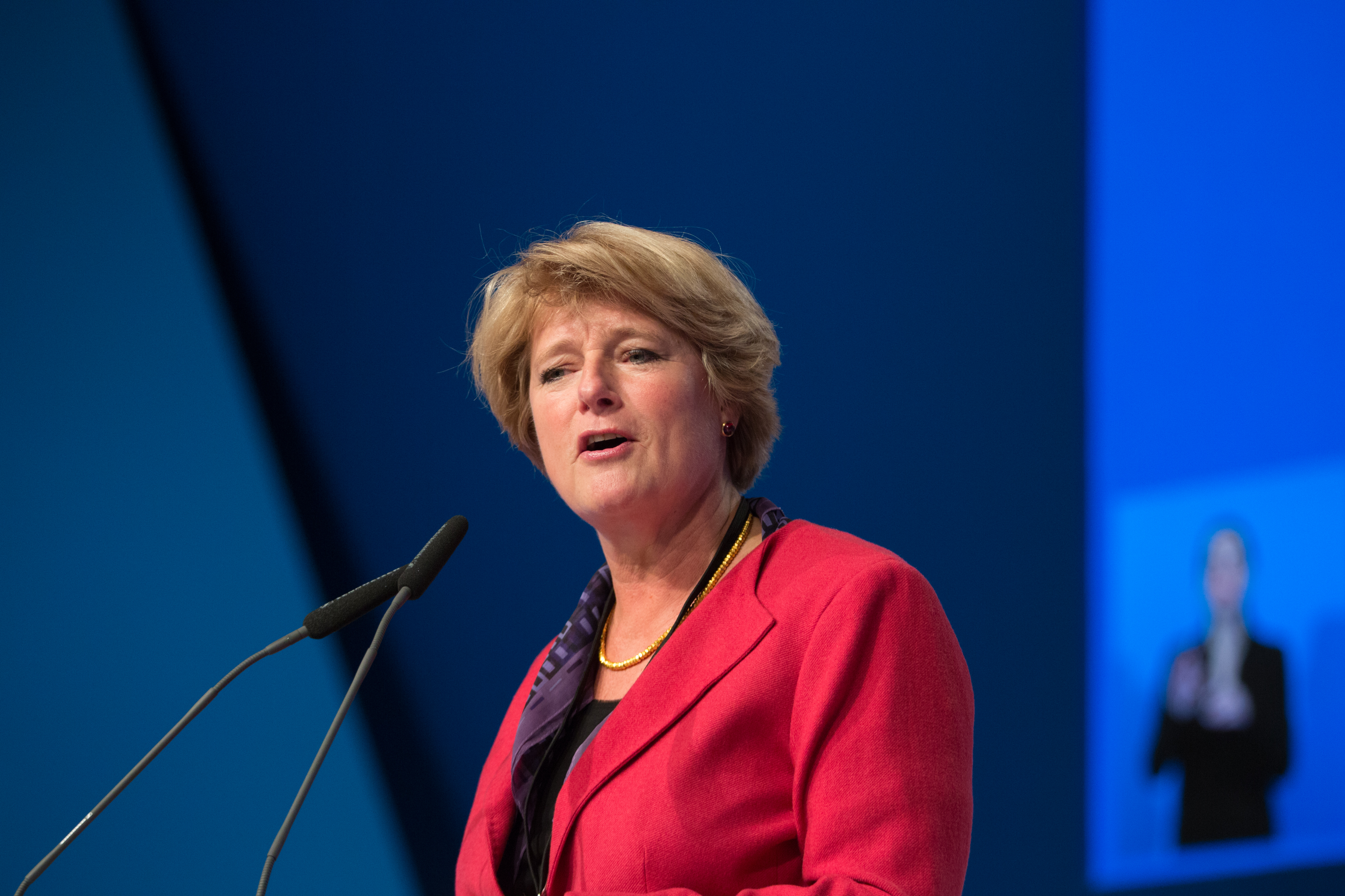 Monika Grütters, Staatsministerin und Mitglied des CDU Bundesvorstandes auf dem 29. Parteitag der CDU Deutschlands am 6. Dezember 2016 in Essen, Grugahalle